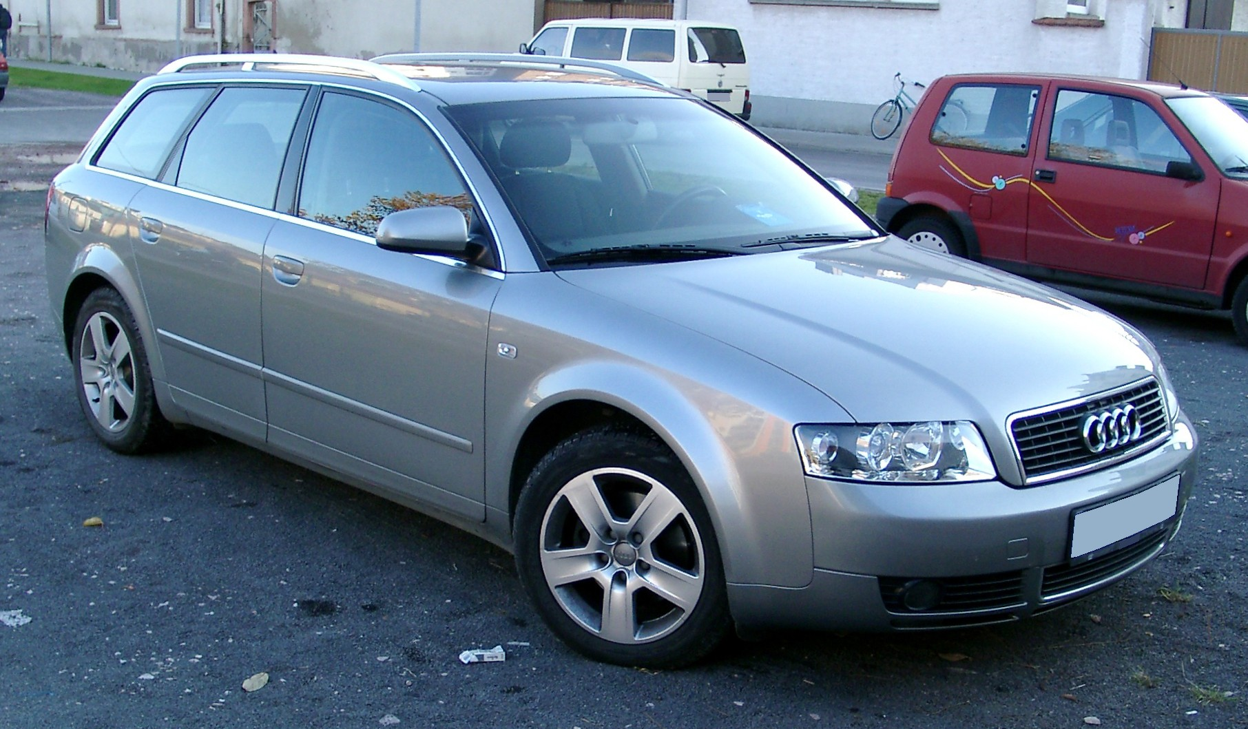 Audi A4 B6